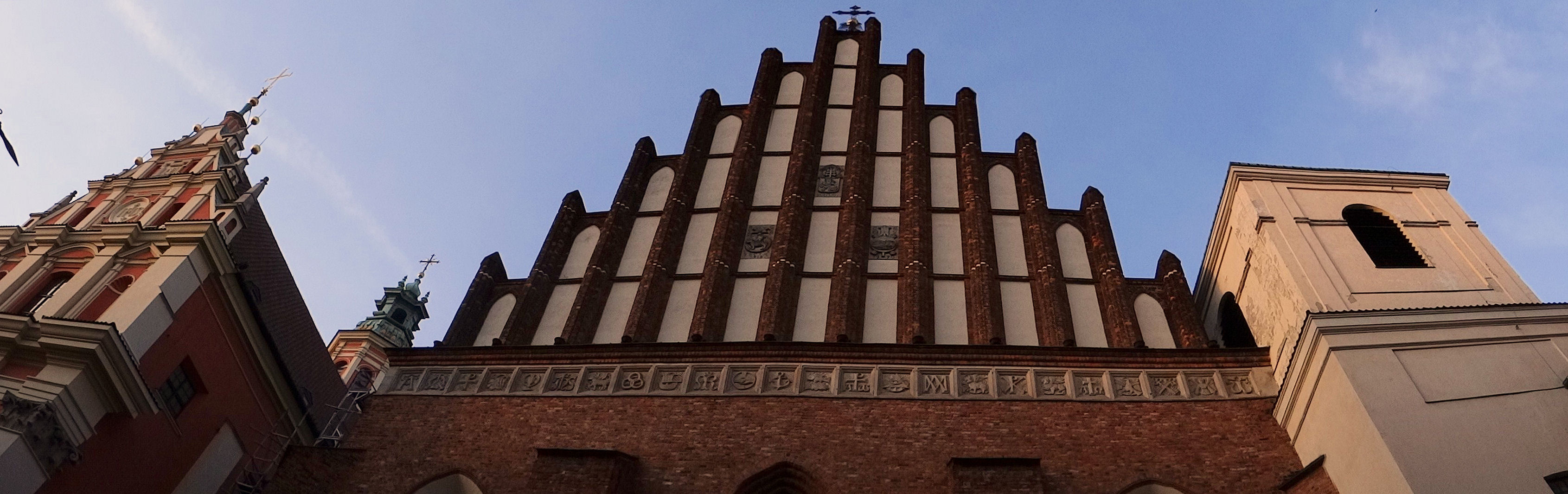 Fragment frontowej elewacji z tympanonem i szlakiem reliefowych symboli pod nim